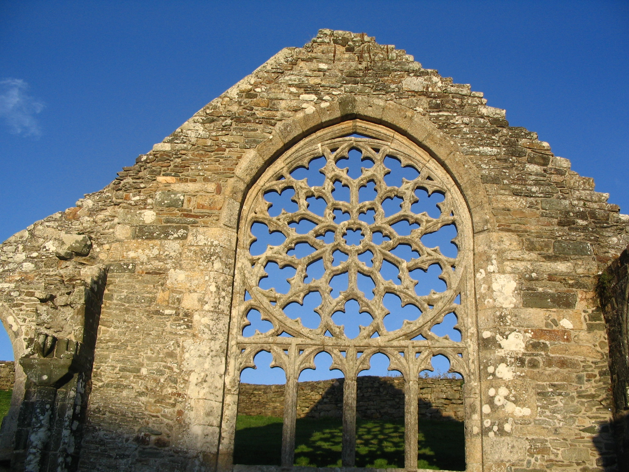 Plovan - Finistère - France - Ruines de la Chapelle de Languidou